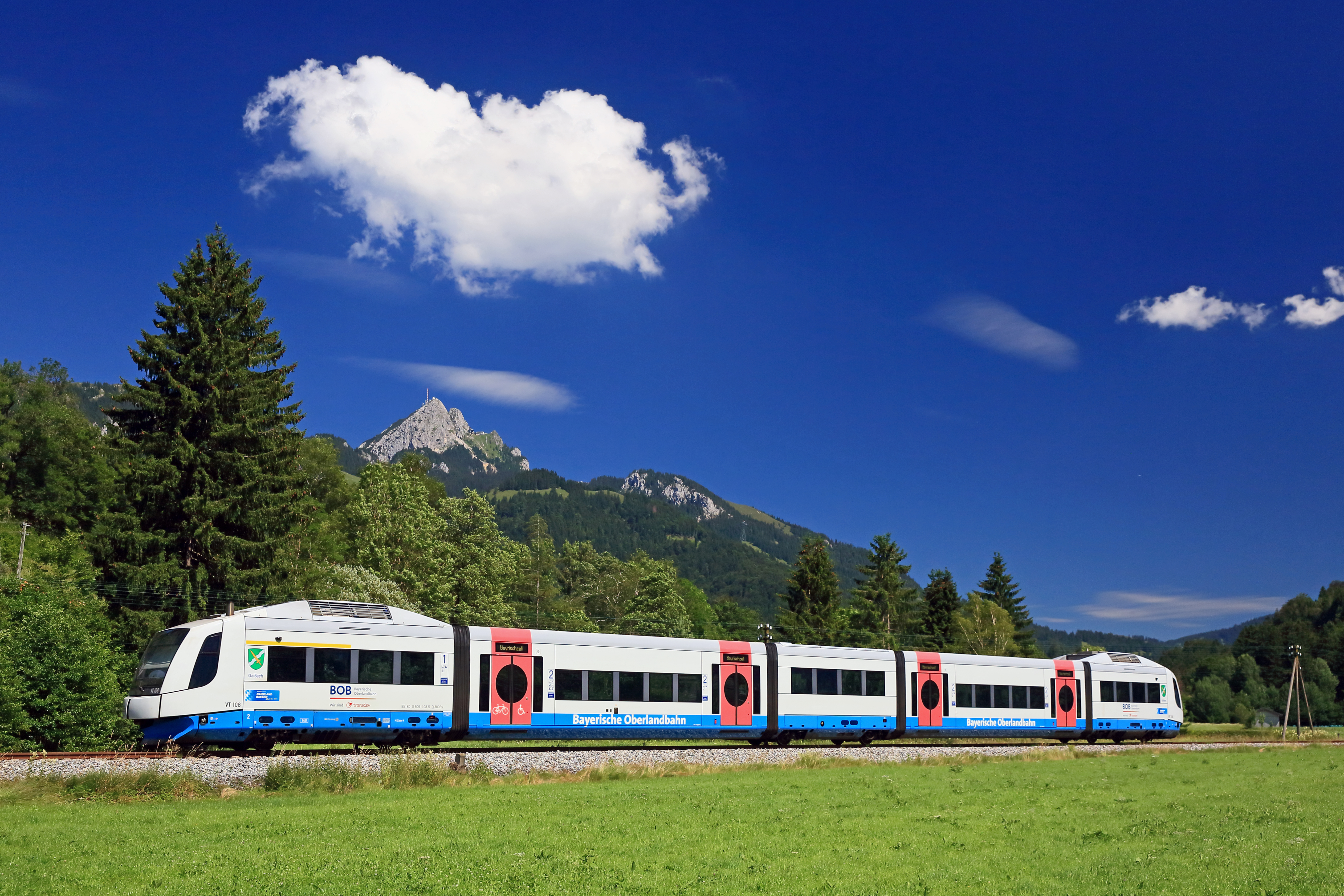 Integral der BOB ist auf dem Streckenabschnitt Holzkirchen - Bayrischzell unterwegs